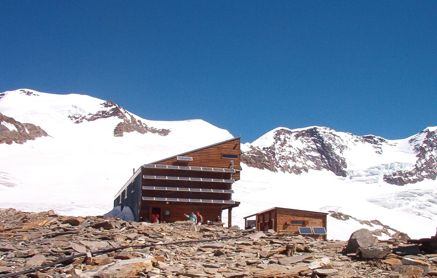 Rifugio Quintino Sella al Felik - Valle del Lys - Valle d'Aosta - Italia